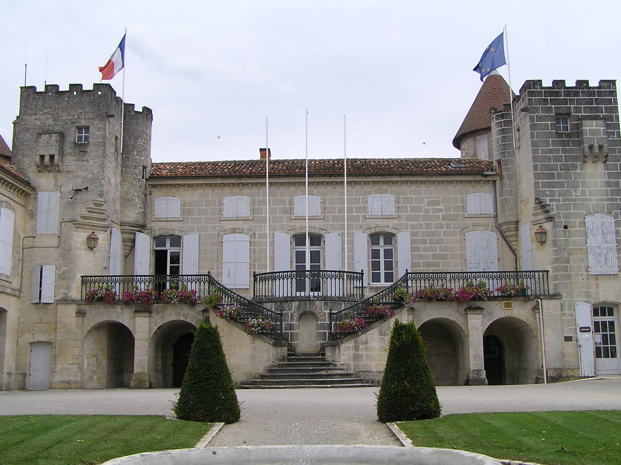 mairie de Nersac